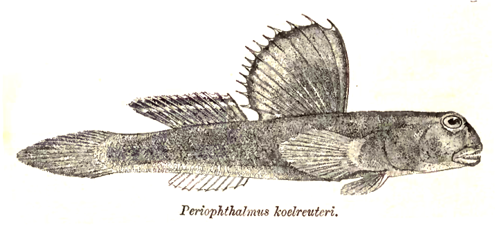 Periophthalmus koelreuteri = Periophthalmus barbarus (Linnaeus, 1766)